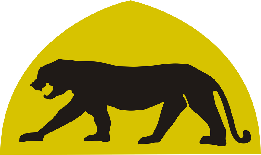 Oznaka 14 Wielkopolskiej Brygady Pancernej Polskich Sił Zbrojnych na Zachodzie